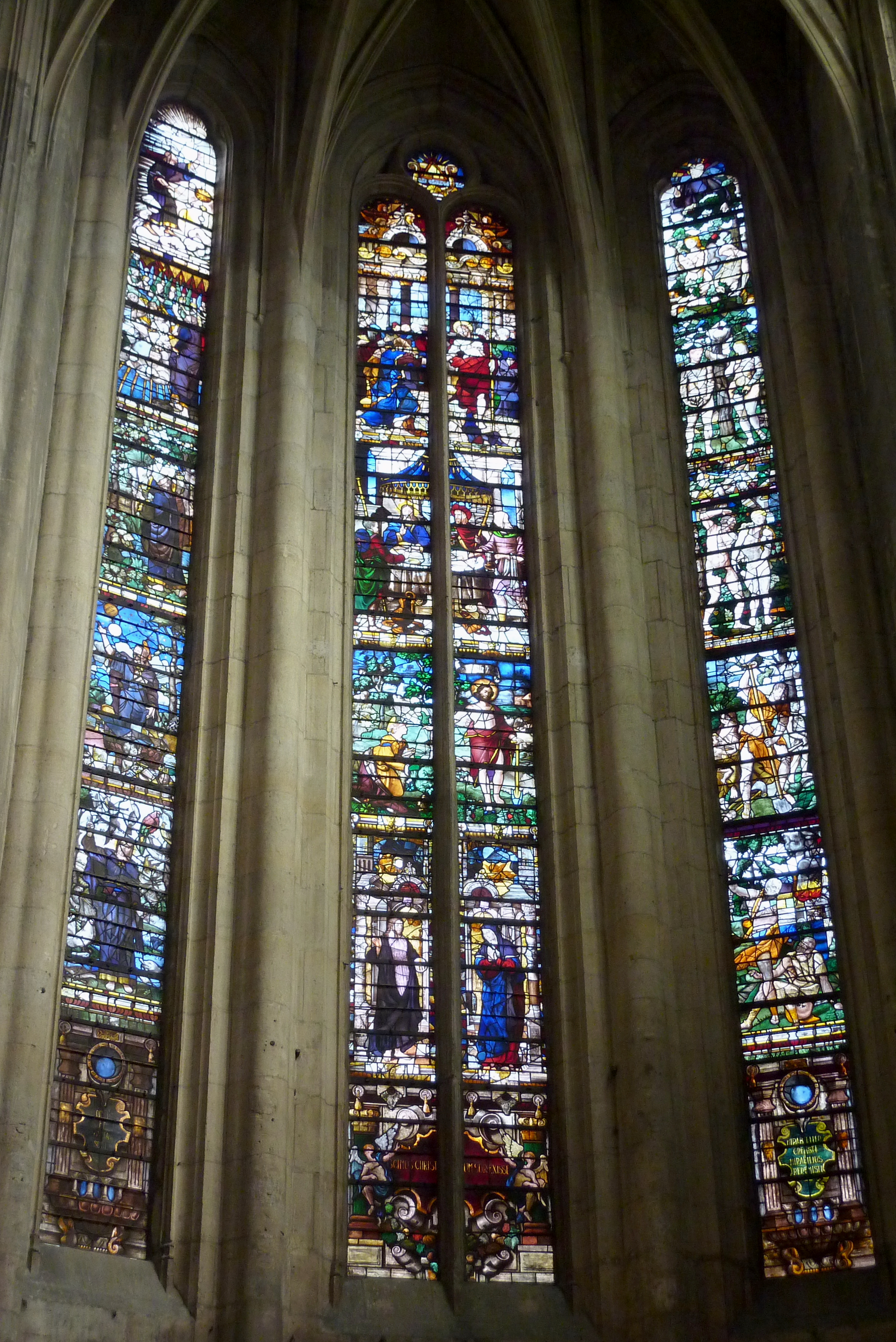 Katholische Pfarrkirche Saint-Aspais in Melun im Département Seine-et-Marne in der Region Île-de-France (Frankreich), Bleiglasfenster im Chor aus dem 16. Jahrhundert, Darstellung: Erschaffung der Welt (rechts und links), Auferstehung Christi (Mitte)